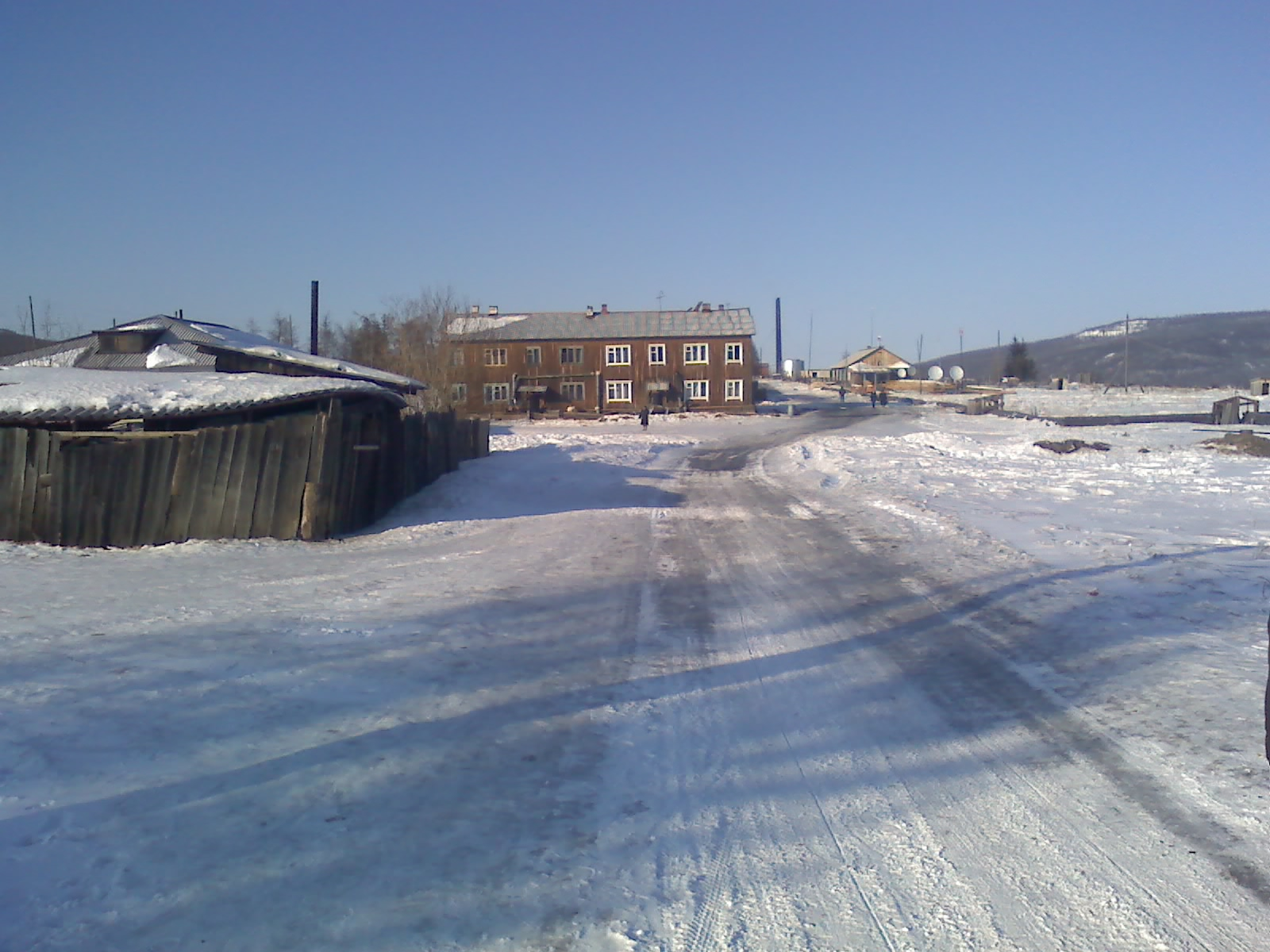 Нидым